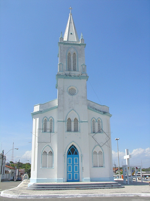 Igreja do Santo Antônio